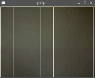 Cuadrícula